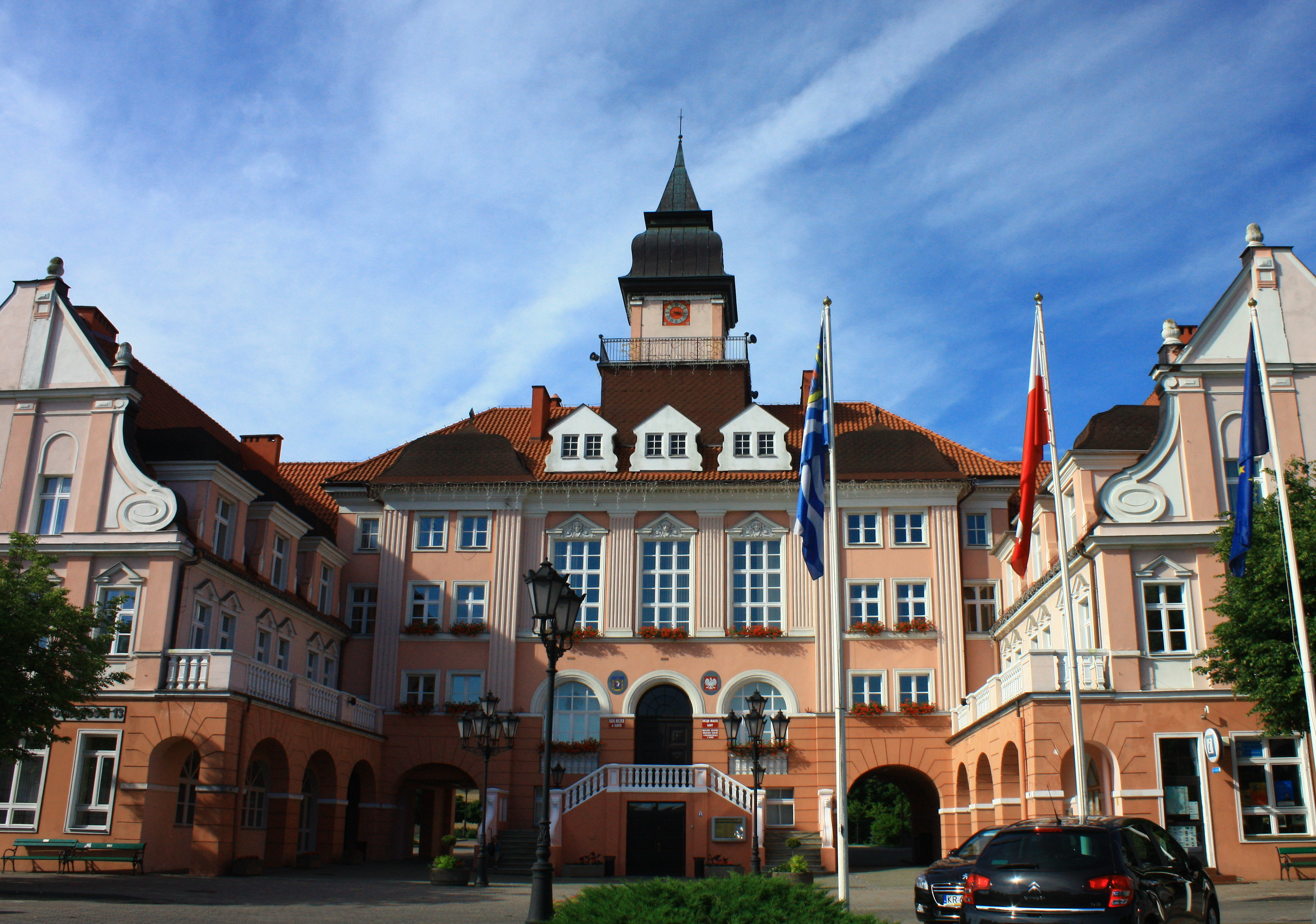 Iława, ratusz, 1912-1913